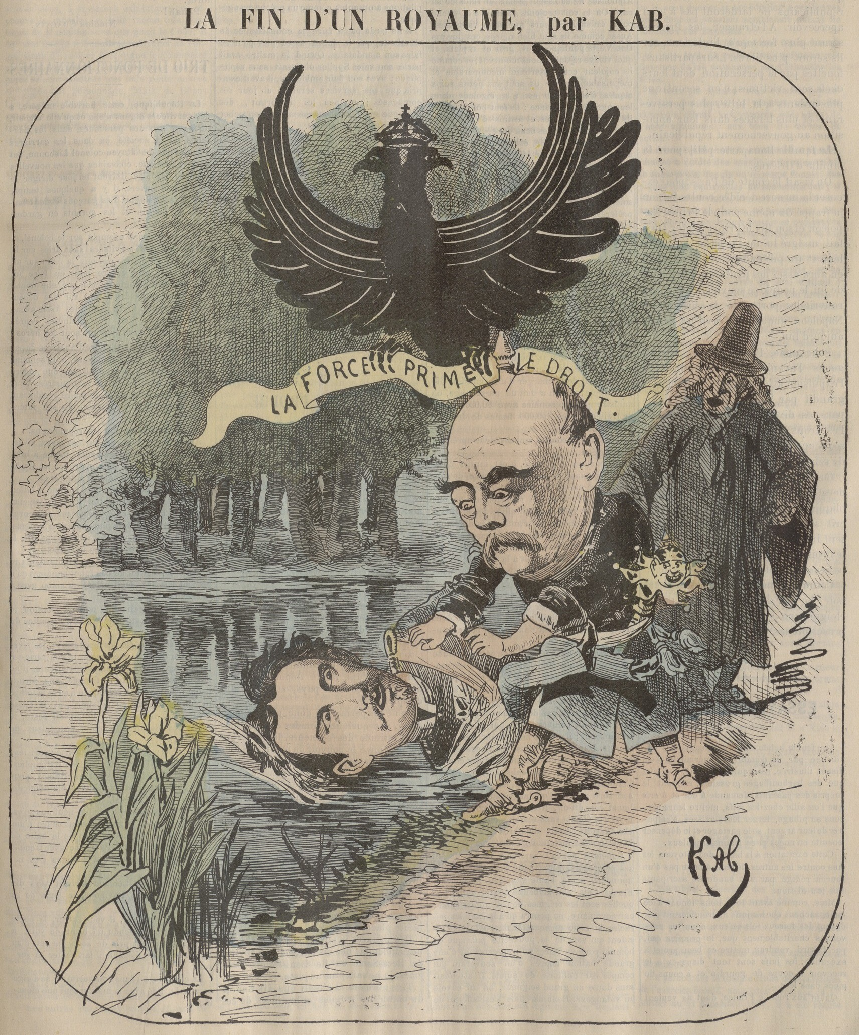 "La fin d'un royaume".